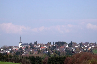 Winterscheid aus Richtung Hatterscheid gesehen